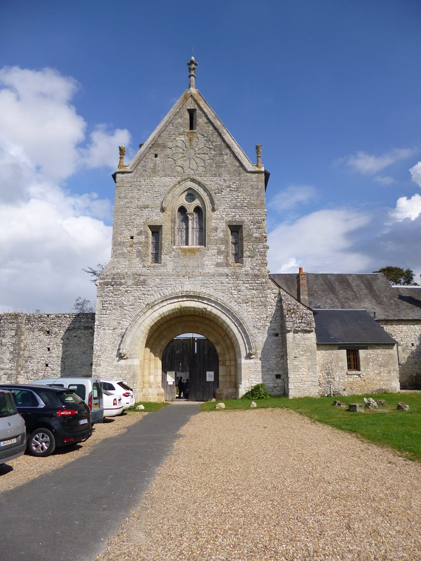 Portail monumental. Accès principal du domaine.